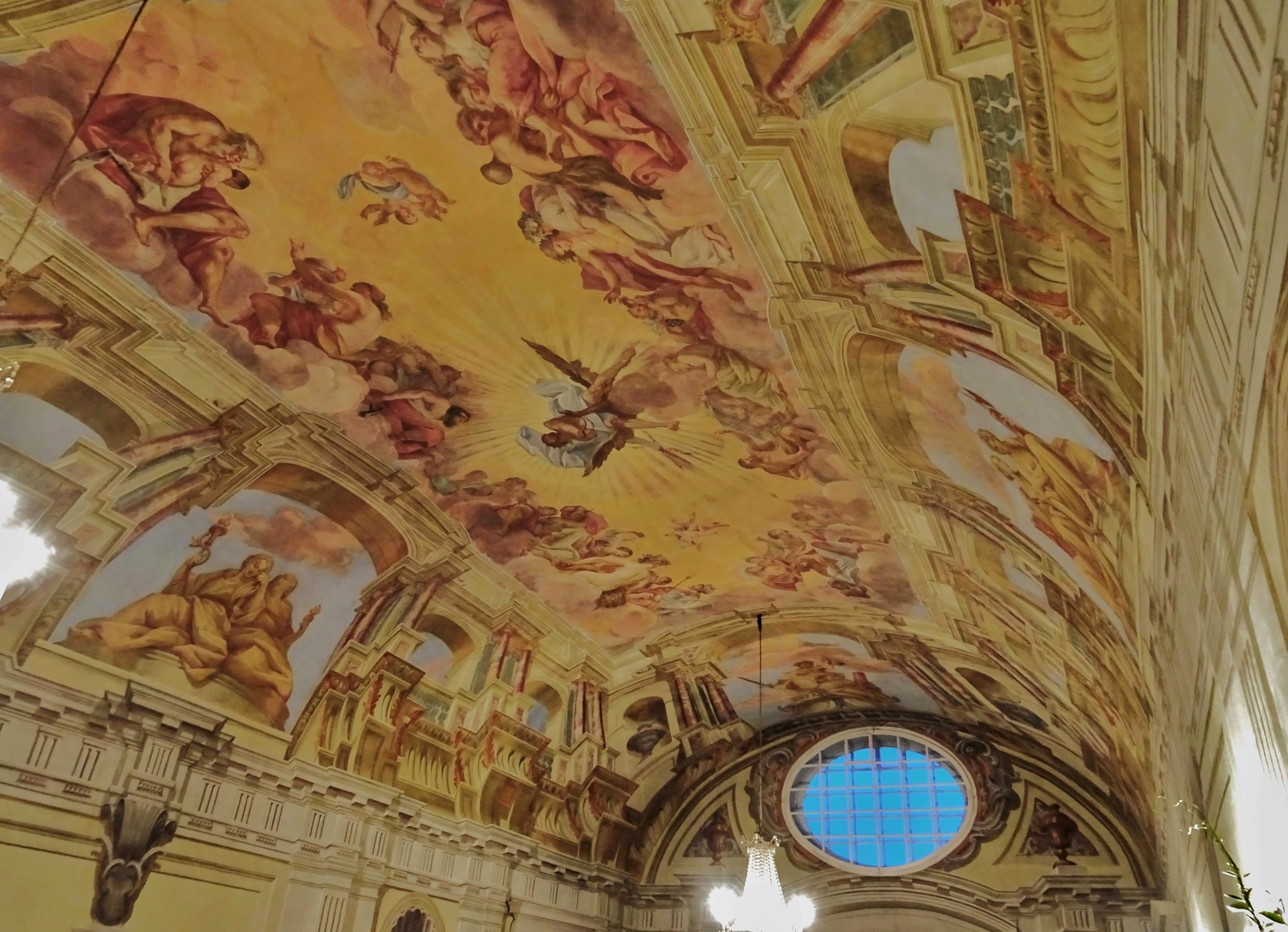 Schloss Ebenthal, Deckengestaltung durch Illusionsmalerei (Scheinarchitektur, J. F. Fromiller 1748) im Festsaal